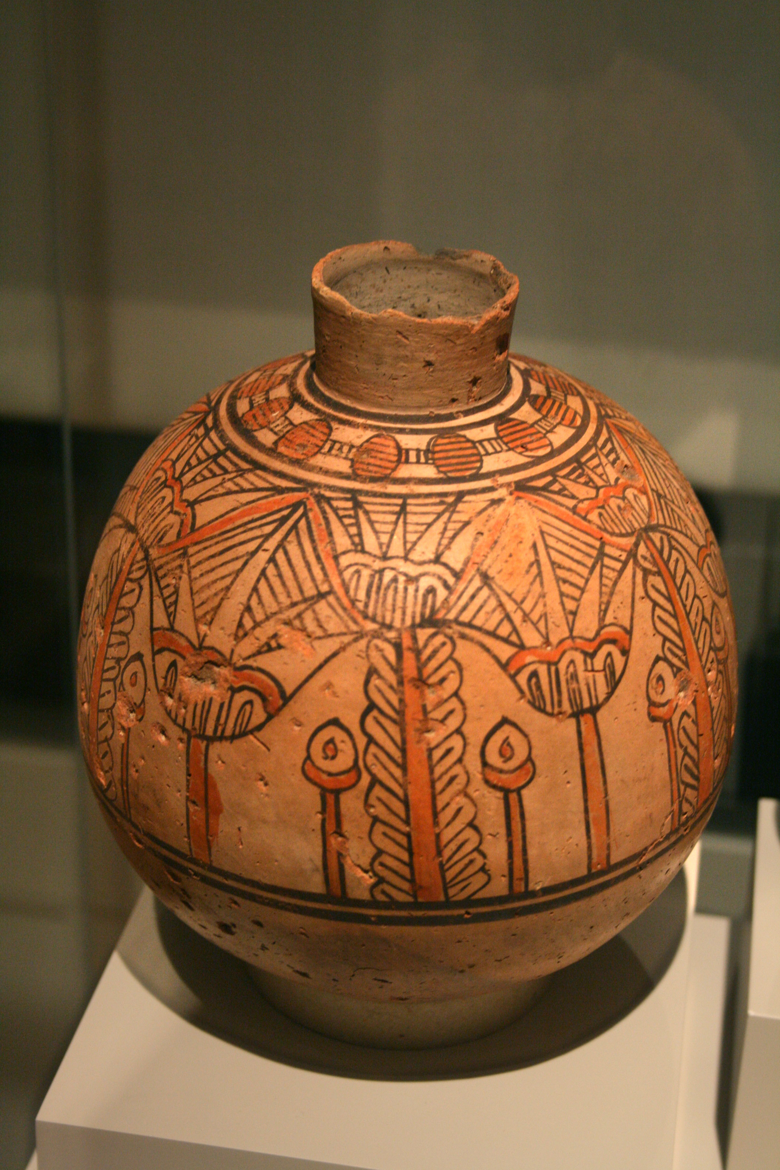 Merotische Keramik aus Faras (heute: Ägyptisches Museum Berlin, Inv. Nr. 20856)